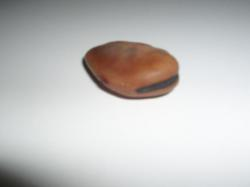 een groningse molleboon